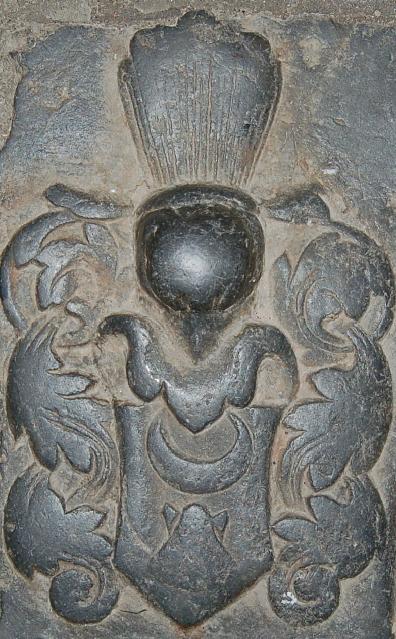 Baden gravplate Hedrum kirke